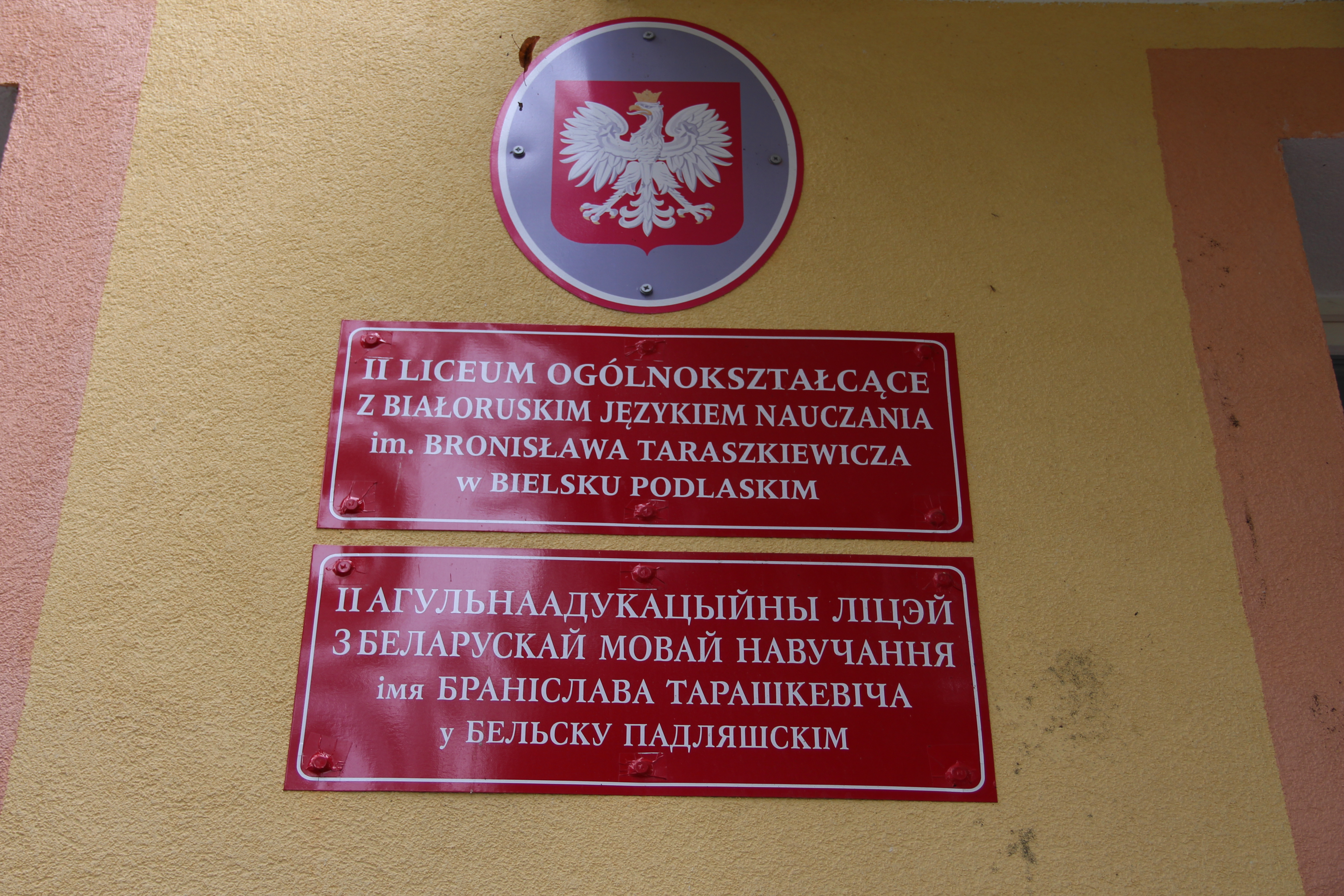 Tasblica ionformacyjna. II Liceum Ogólnokształcące w Bielsku Podlaskim.